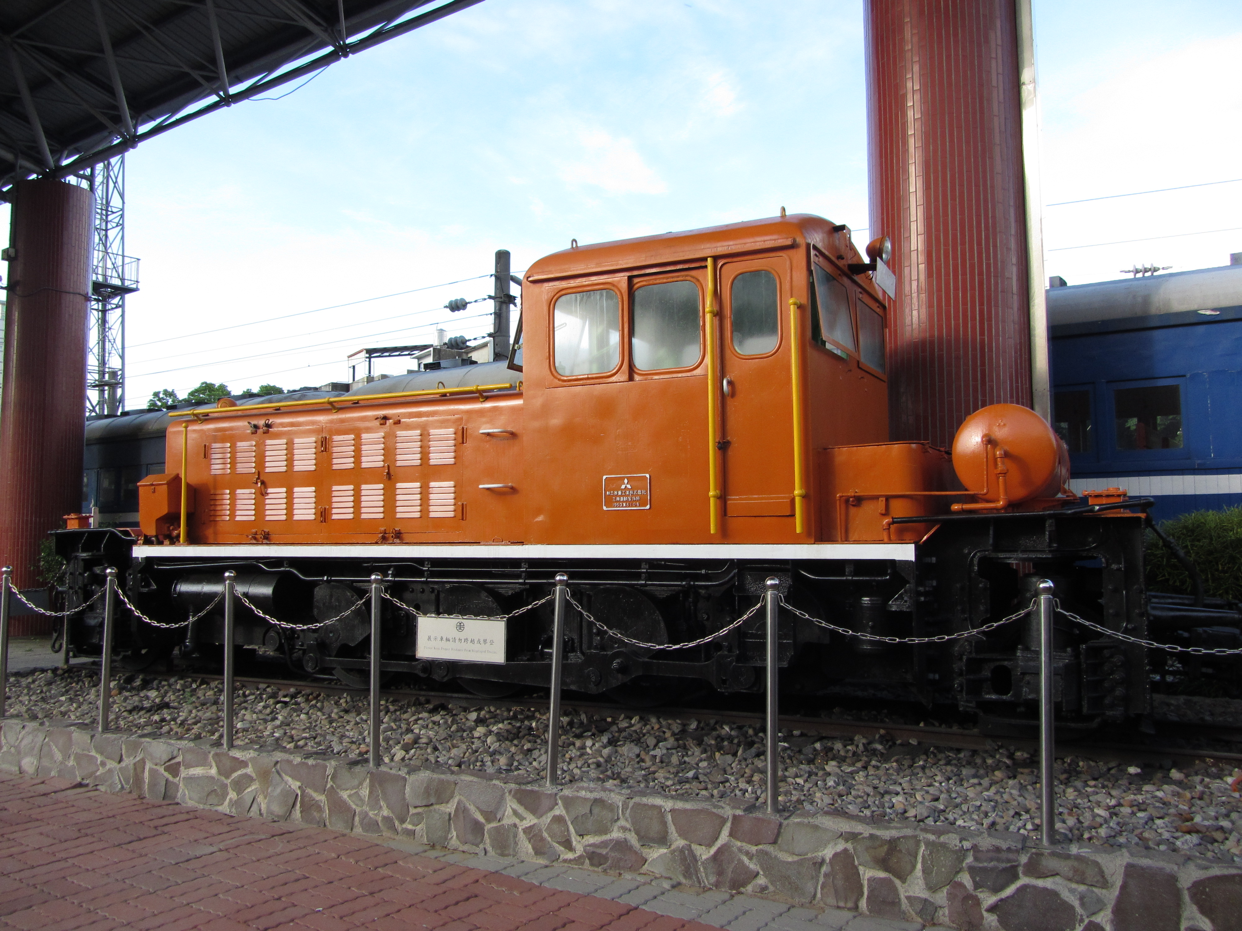 中文（台灣）: 阿里山森林鐵路11403-1柴油機車。